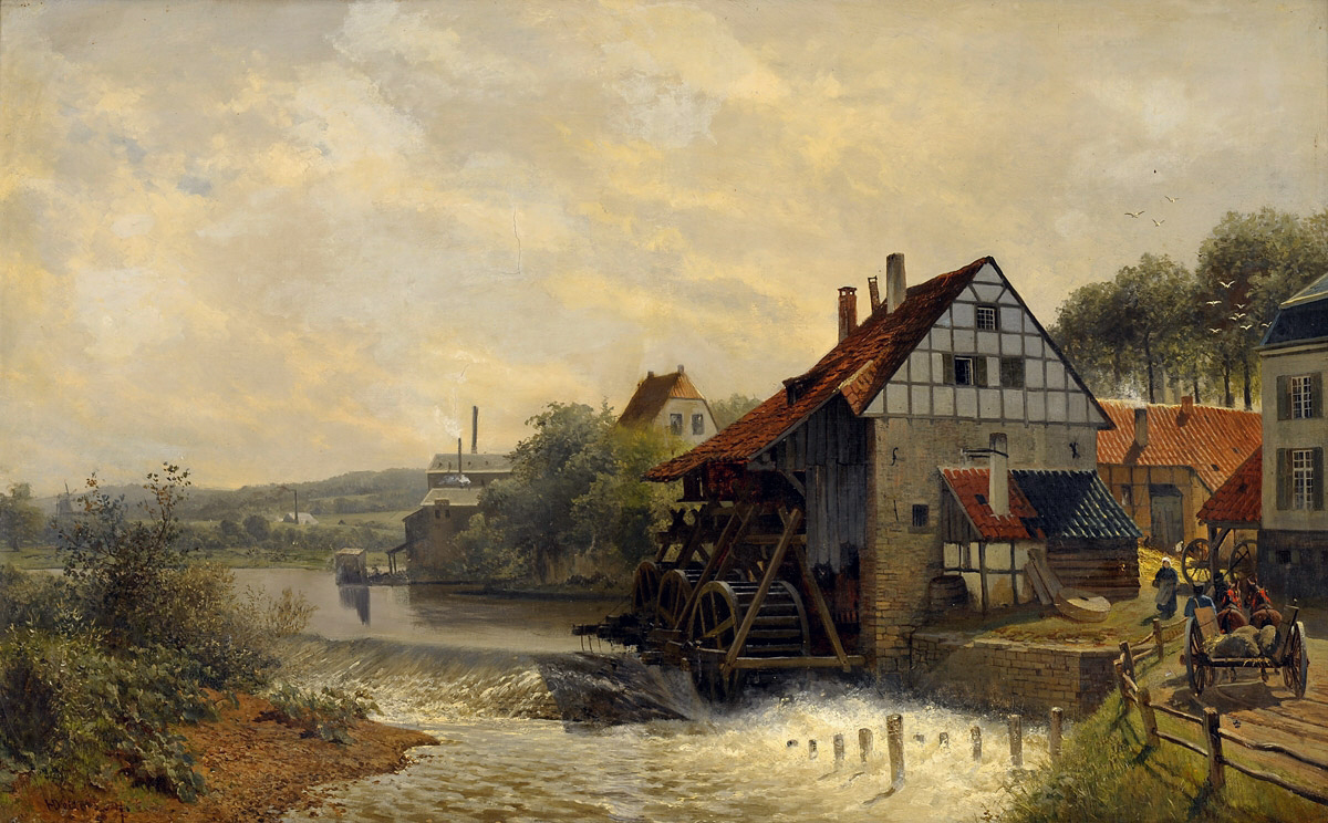 Die Vorstersche Papiermühle zu Broich an der Ruhr (heute Mülheim an der Ruhr). Signiert. Öl auf Leinwand, 70 x 110 cm